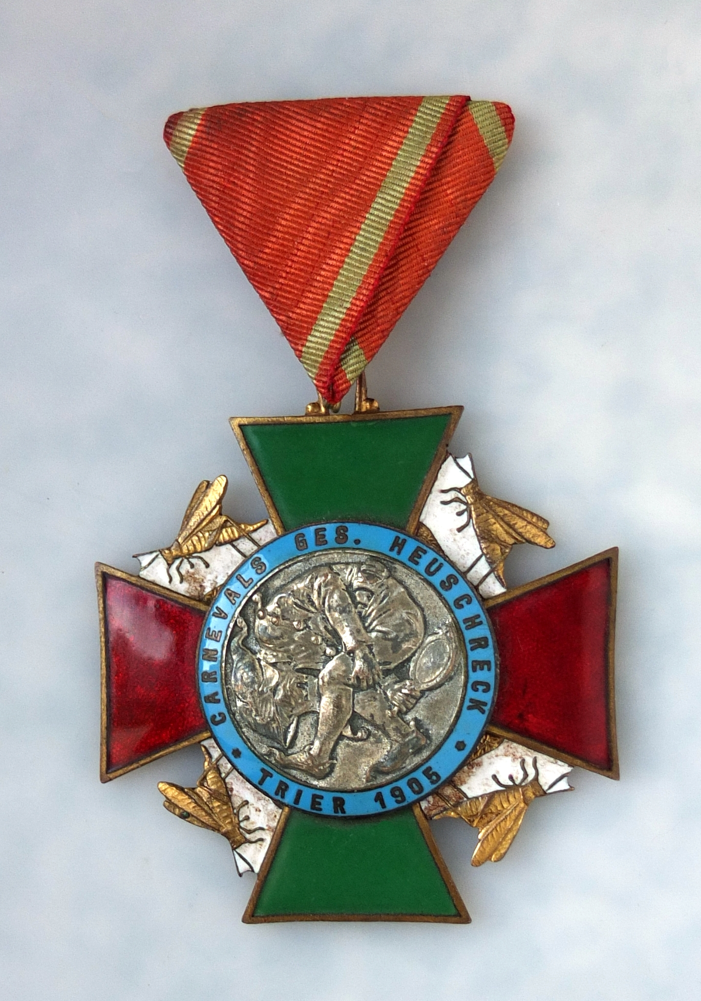 Orden der Trierer Karnevalsgesellschaft Heuschreck von 1905. Die Umschrift „CARNEVALS GES. HEUSCHRECK - TRIER 1905“ umrahmt ein Medaillon mit der Darstellung eines Narren mit seinen typischen Attributen: Er trägt die sogenannte Gugel, einen Vorläufer der Narrenkappe mit zwei überlangen Zipfeln, einen Kragen mit Schellen und Schnabelschuhe. Des Weiteren hält er einen Spiegel, seit dem Mittelalter ein galäufiges närrisches Attribut, mittels dessen er sich Einblick in sein Gesäß verschafft. Umrahmt wird das Medaillon von einen geflügelten Kreuz, dem sogenannten Tatzenkreuz (auch Cross pattée genannt), das die Deutung als Persiflage auf das ähnlich geformte preußische Eisernen Kreuz nahelegt.